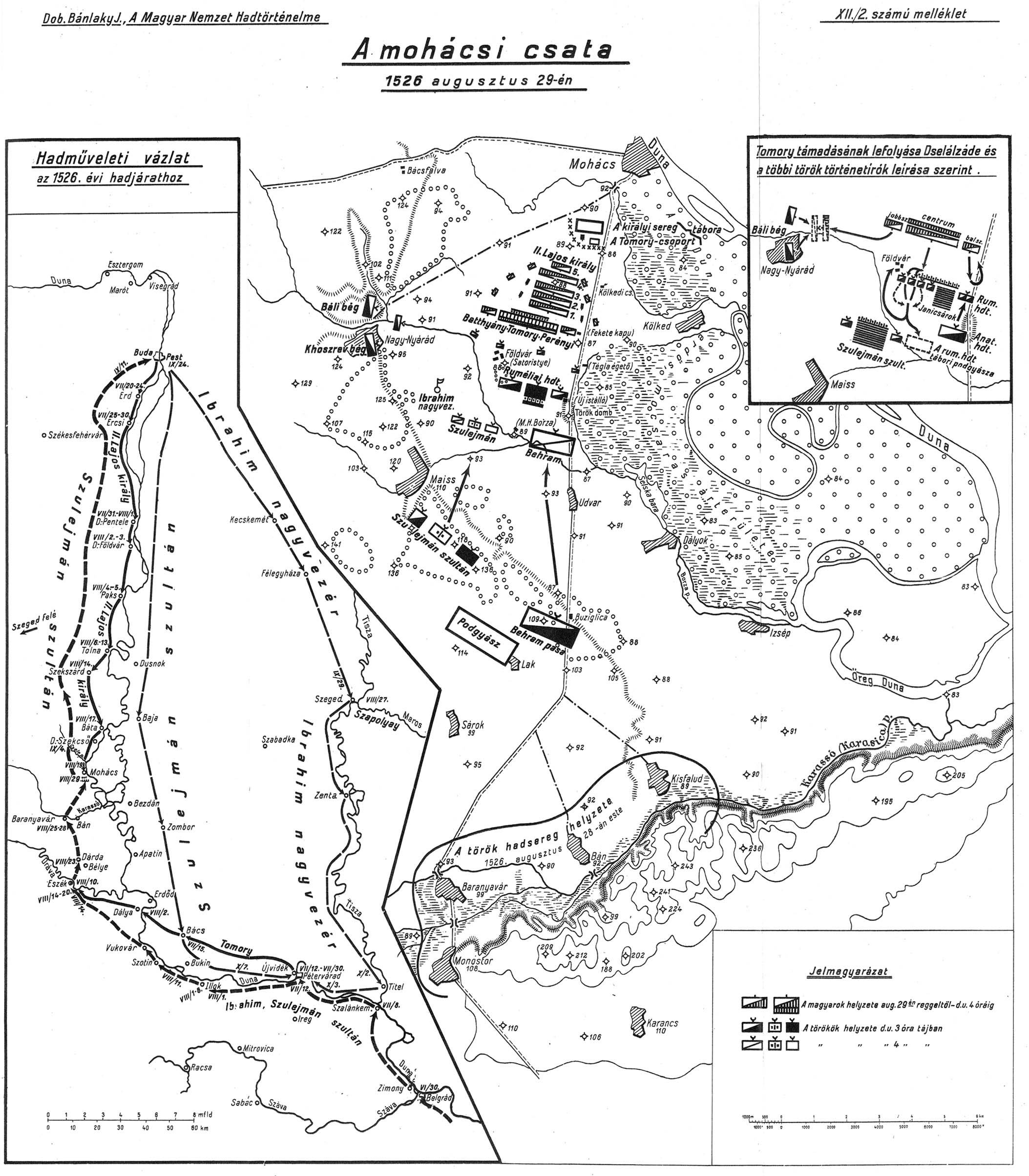 BÁNLAKY JÓZSEF Bánlaky József: A MAGYAR NEMZET HADTÖRTÉNELME mellélet - 12-2. sz. A mohácsi csata 1526 augusztus 29-én